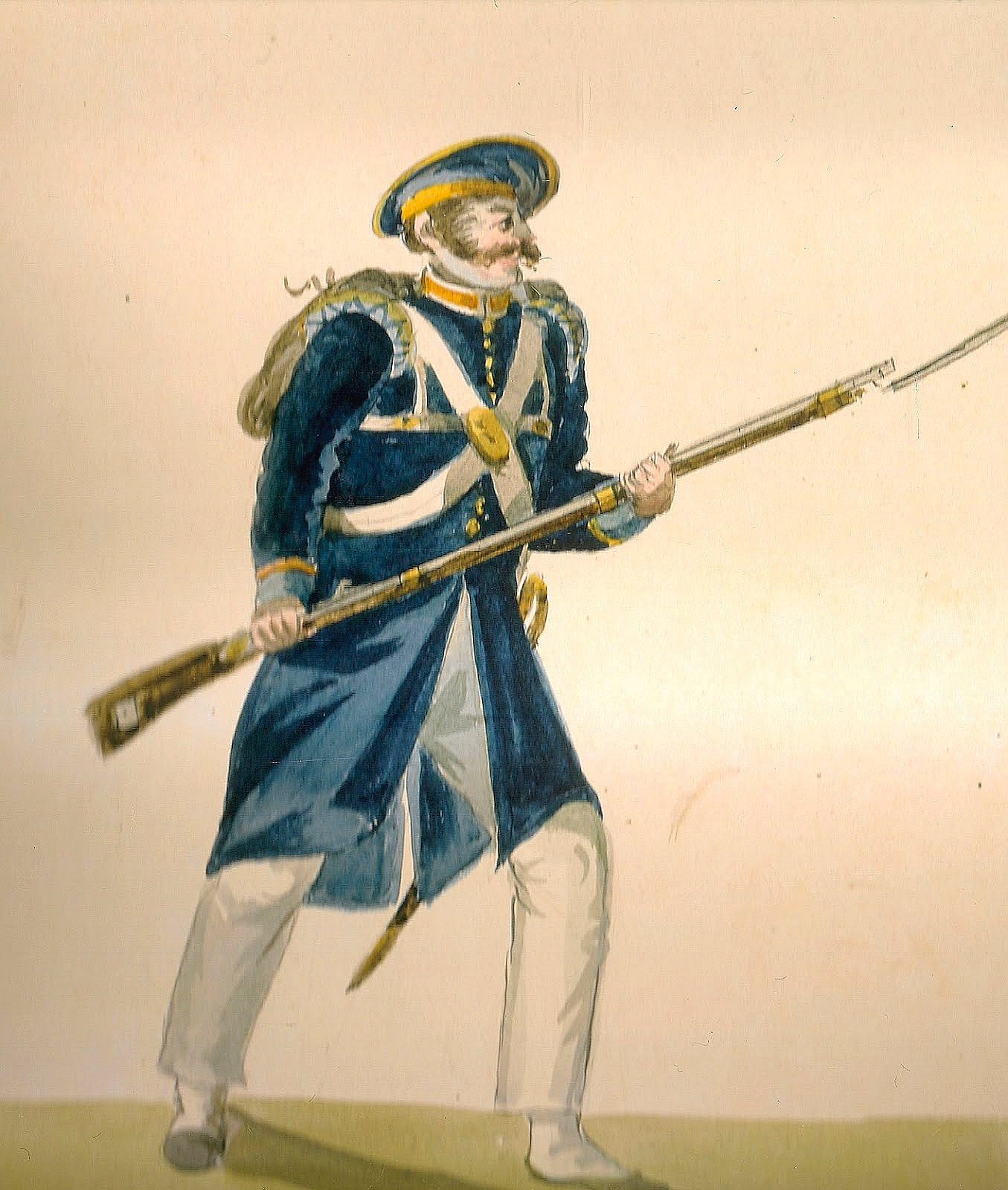 independencia de México. Soldado asturiano del Ejército Realista. Acuarela de Theubet de Beauchamp